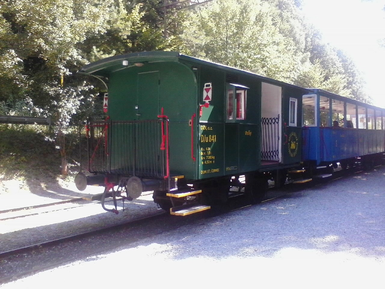 Služobný vozeň D/u 841 "Peťko" z roku 1886 je najstarším vozňom na Slovensku, ktorý dodnes slúži svojmu pôvodnému účelu.